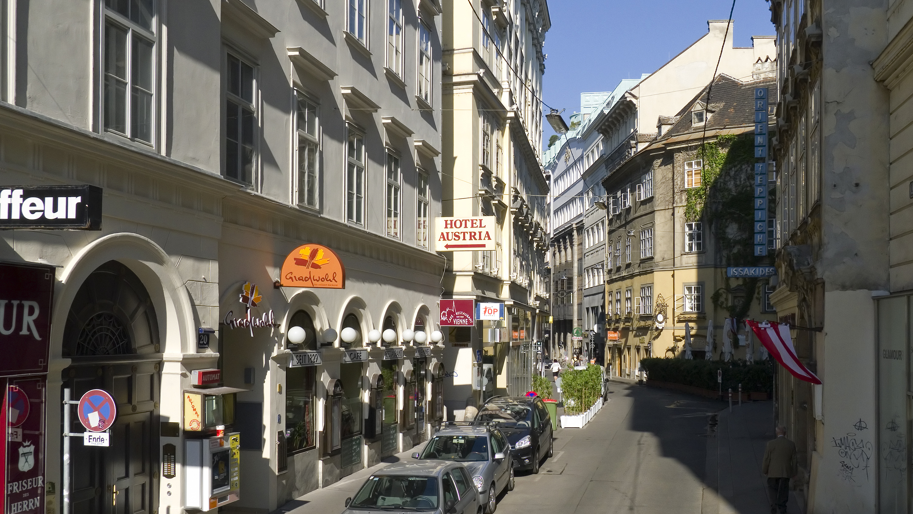 Fleischmarkt in Wien 1 bei Nr. 17 in Richtung Nordwesten